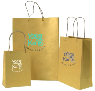 Tas Kertas bahan Kraft paper atau Kertas samson